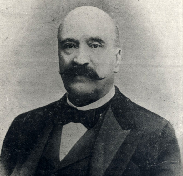 Víctor López Seoane naturalista galego do século XIX.